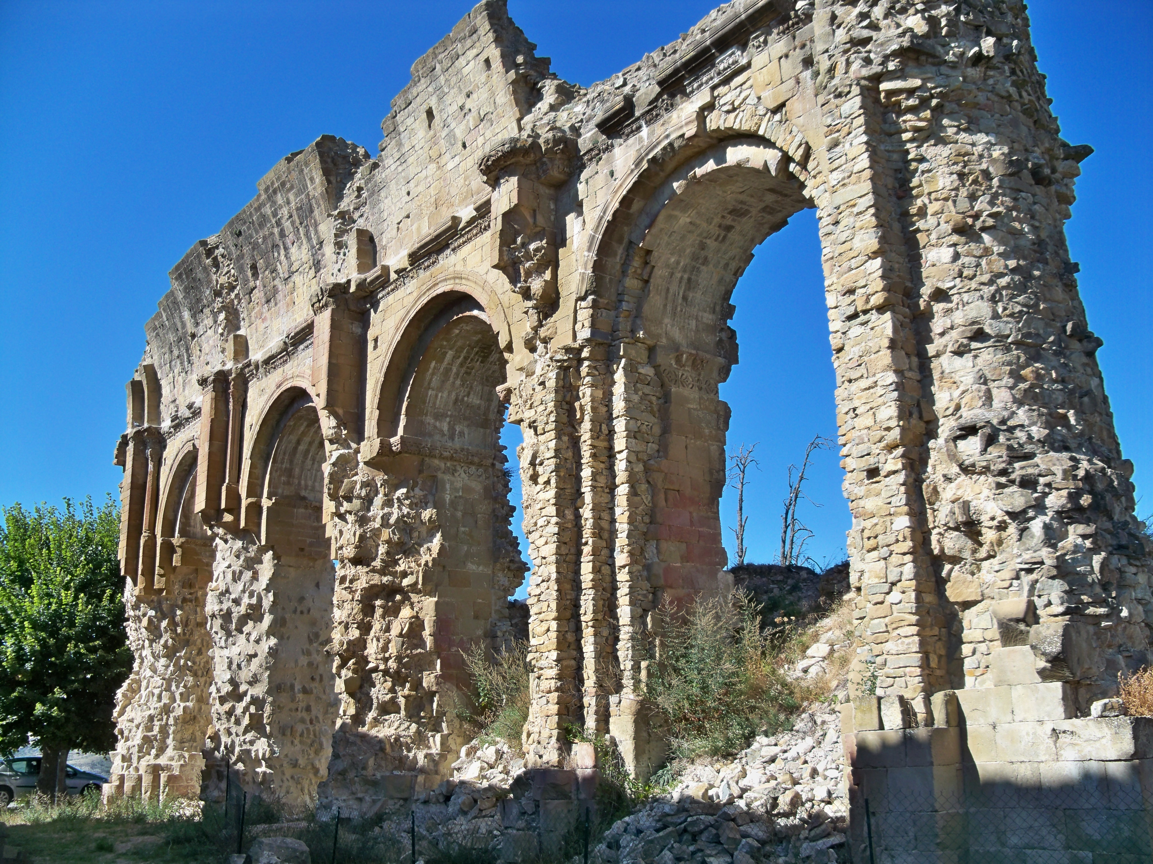 Prieuré, (ClasséInscritClassé, 192519861987) .